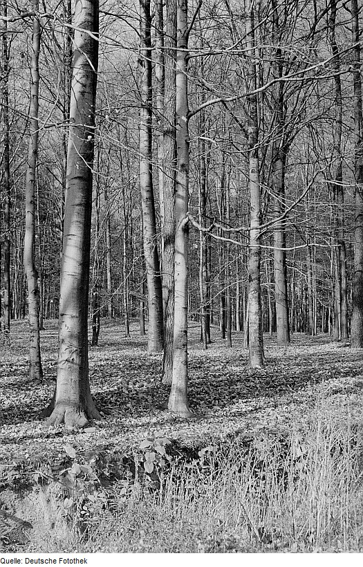 Original image description from the Deutsche FotothekWaldstück